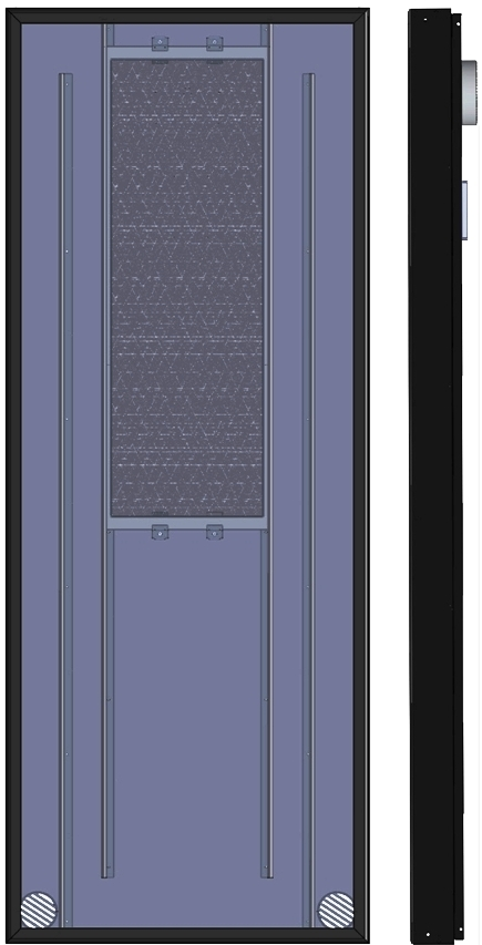 SEA120 tegning